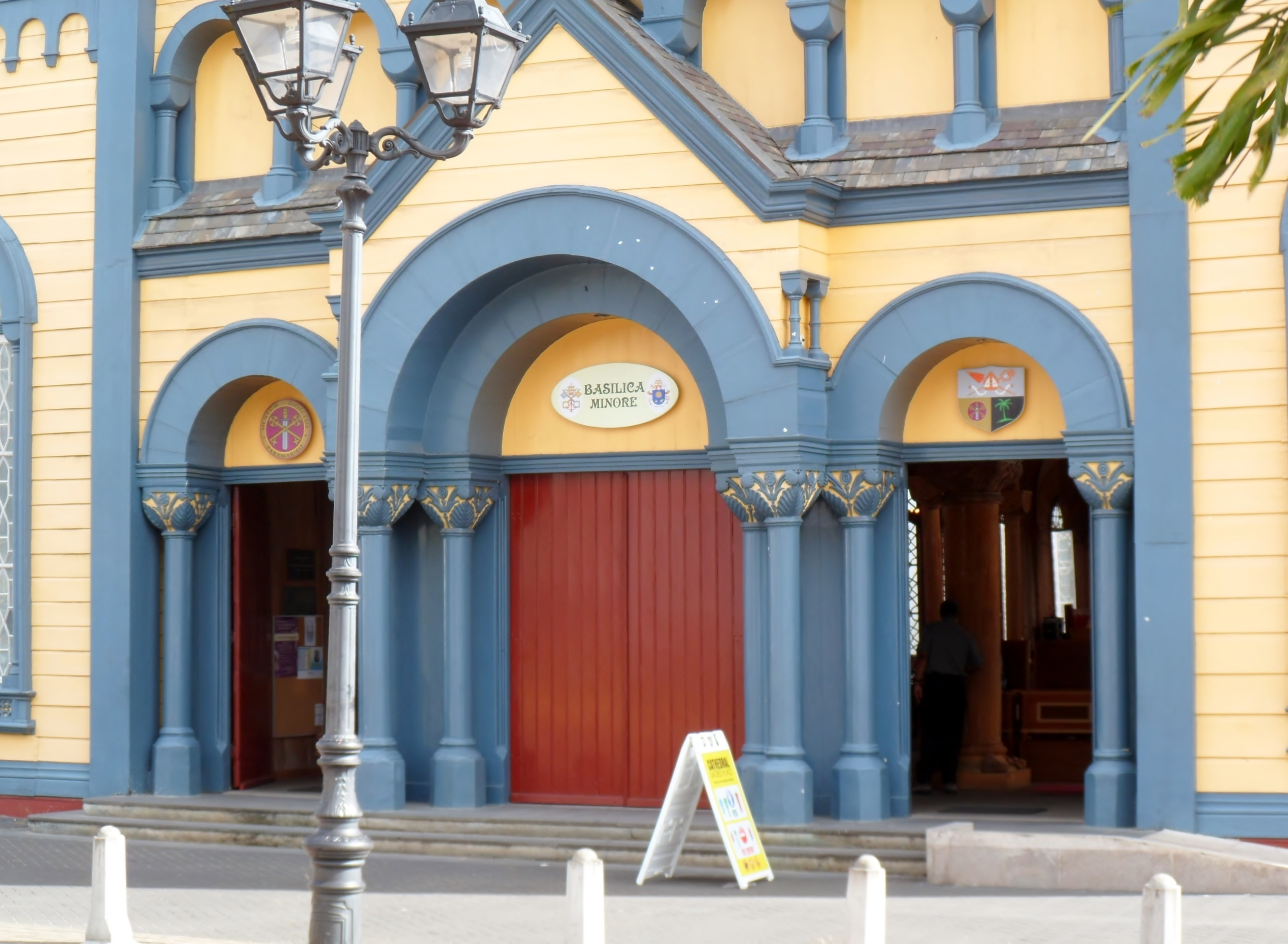 Detail, Eingangsbereich Basilica minor Suriname, Paramaribo